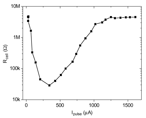 Joonisel on kujutatud faasimuutmaterjali takistuse sõltuvust vastavast programmeerimisvoolust